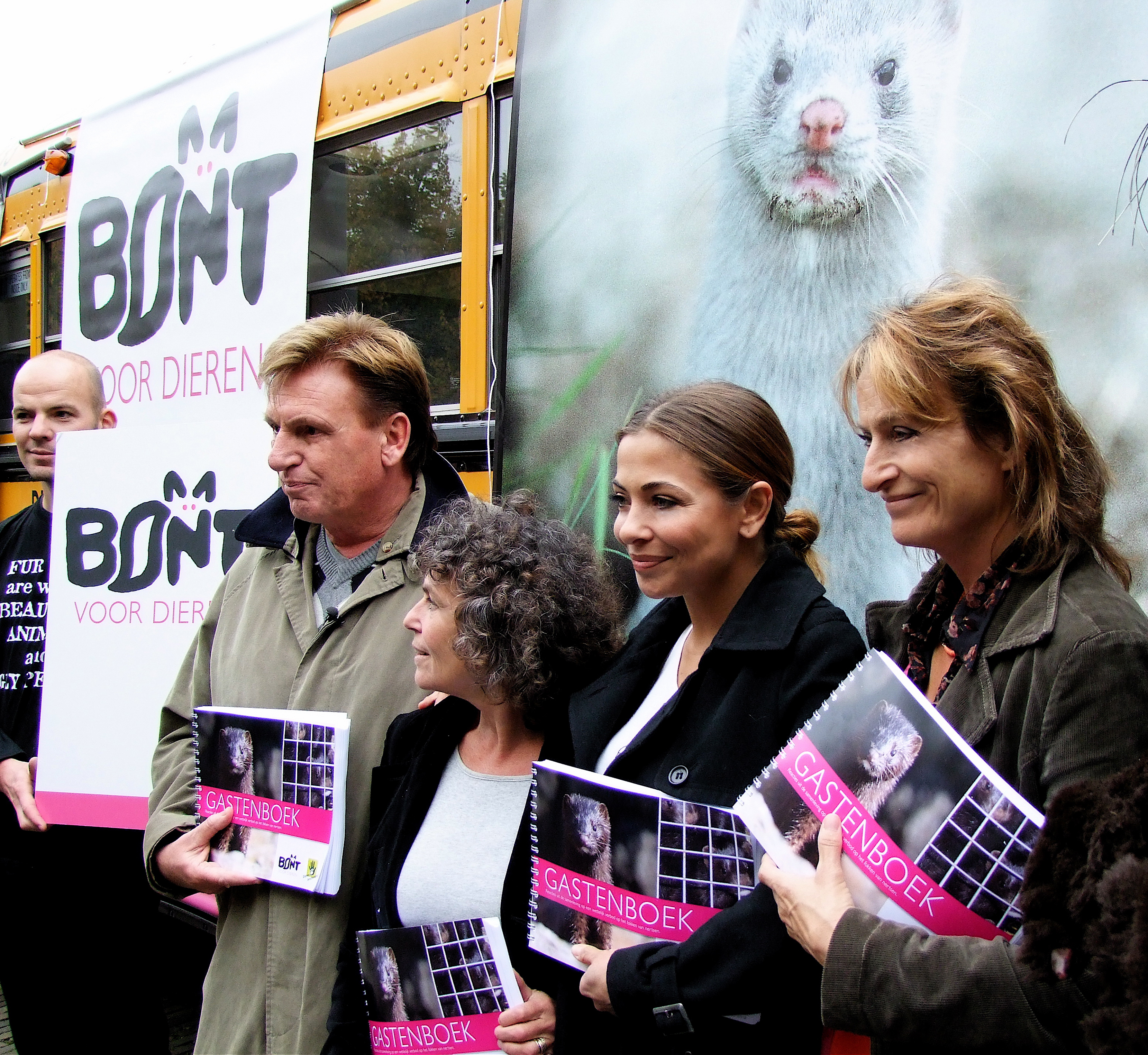 Foto gemaakt op het plein in Den Haag tijdens de aktie Bont voor Dieren in 2008 waaraan Henny Huisman, Yvonne Kroonenberg, Georgina Verbaan en Karen van Holst Pellekaan hun medewerking aan verleenden.